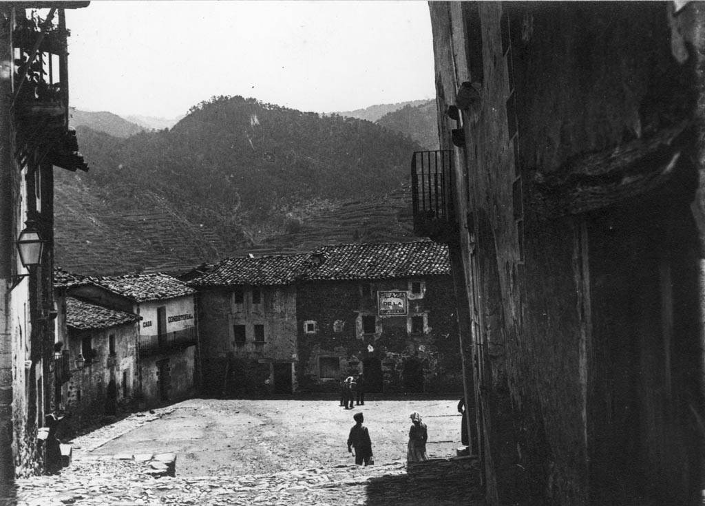 La plaça de la vila de Vallfogona de Ripollès. Cèsar August Torras i Ferreri (Entre 1890 i 1923)